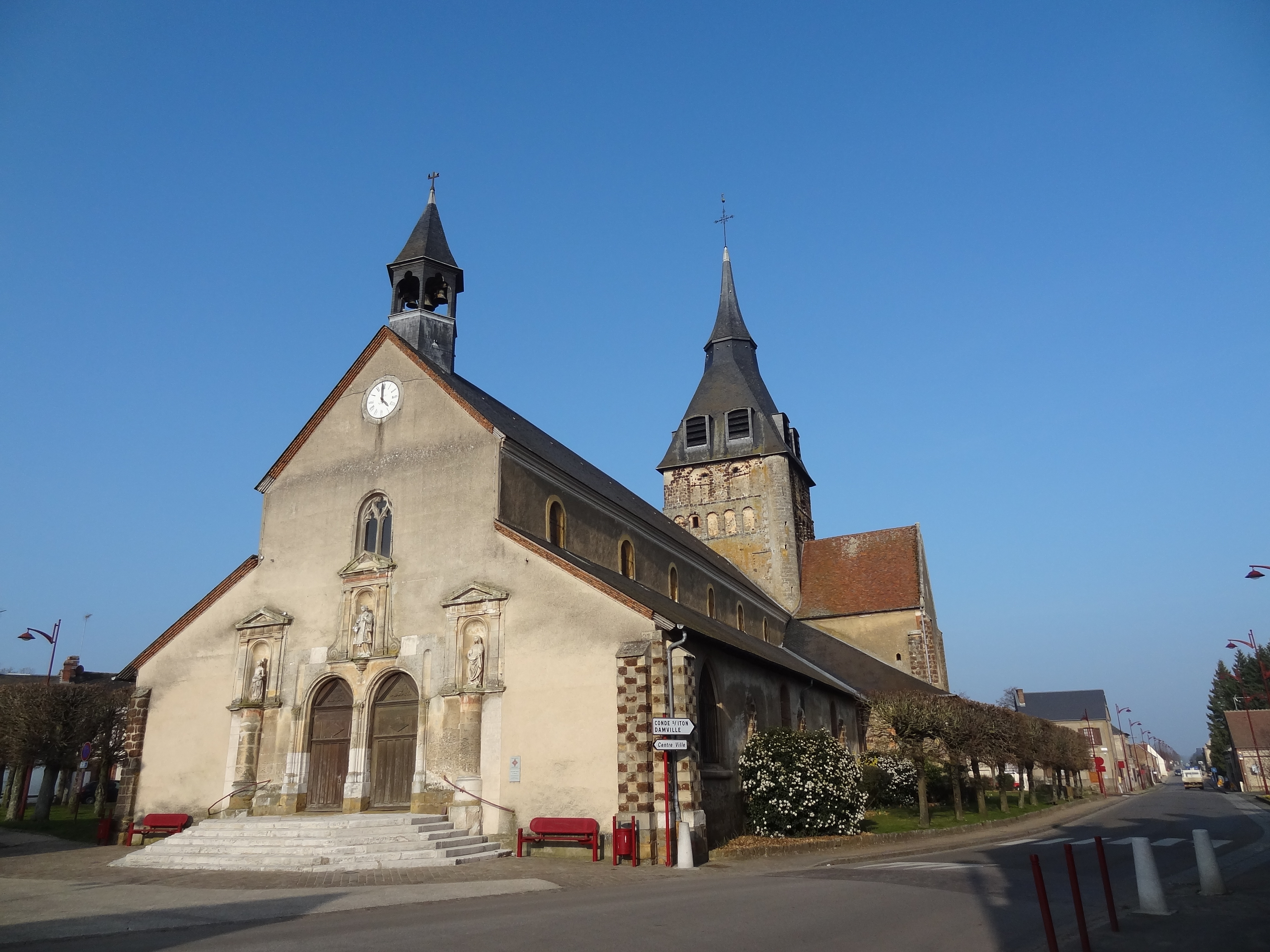 Photo de la ville de Breteuil